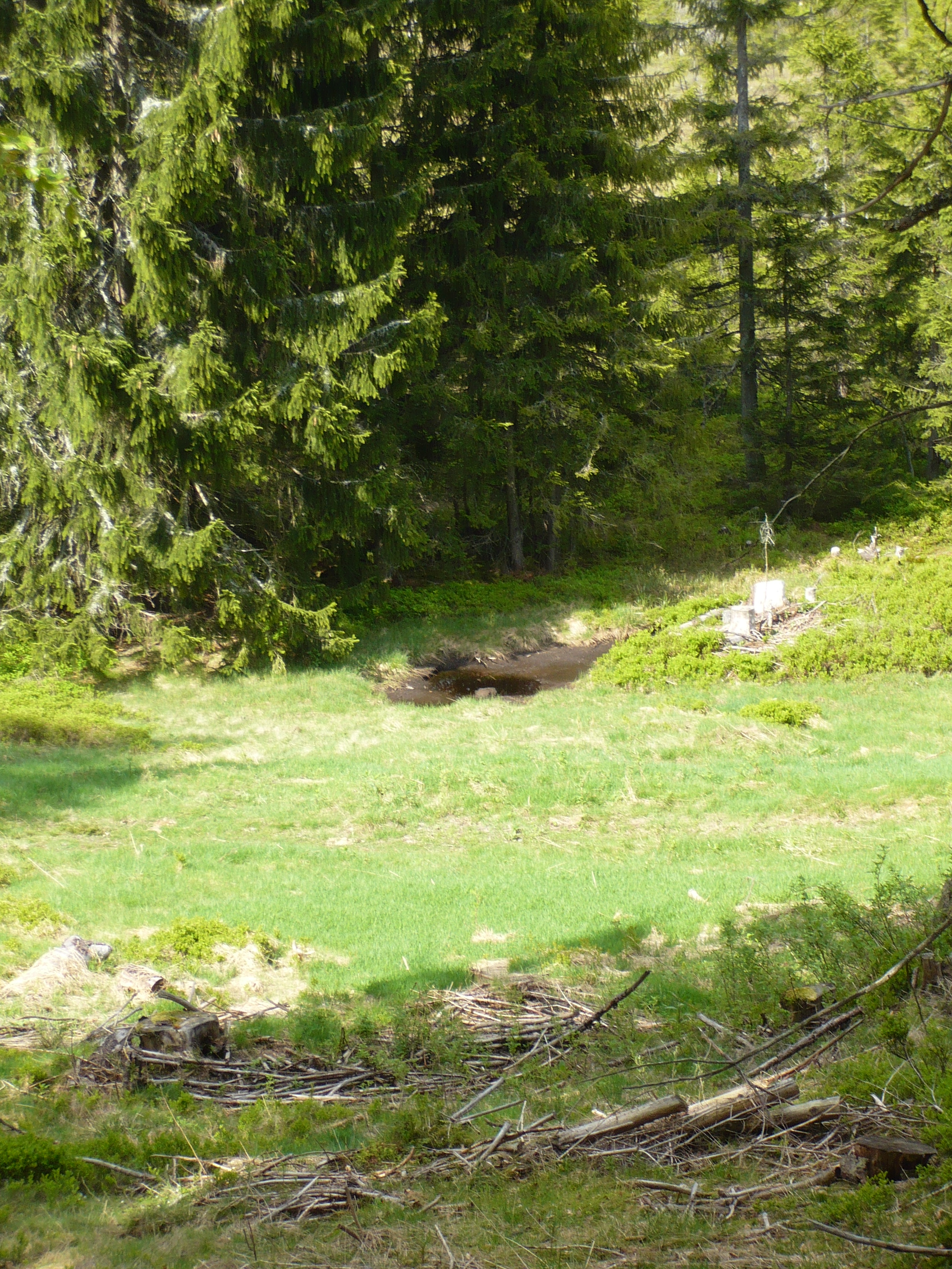 Moorloch im Scheibenlechtenmoos